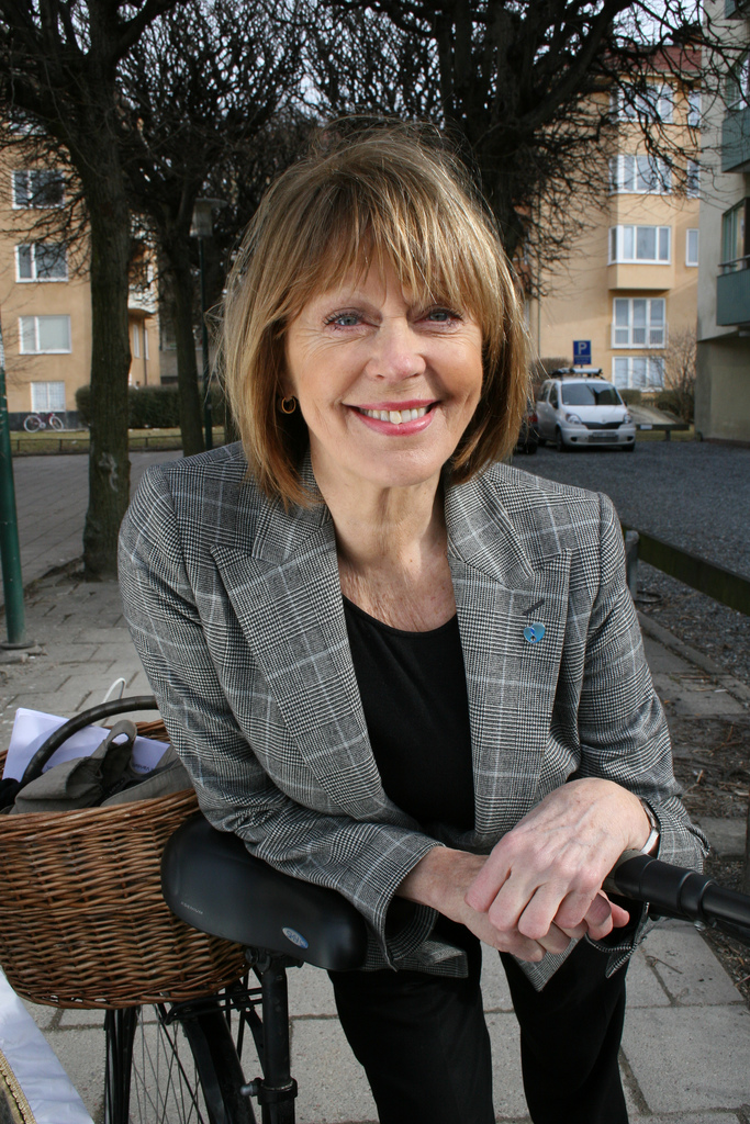 Lill Lindfors är UNICEF-ambassadör och är med och kämpar För varenda unge.